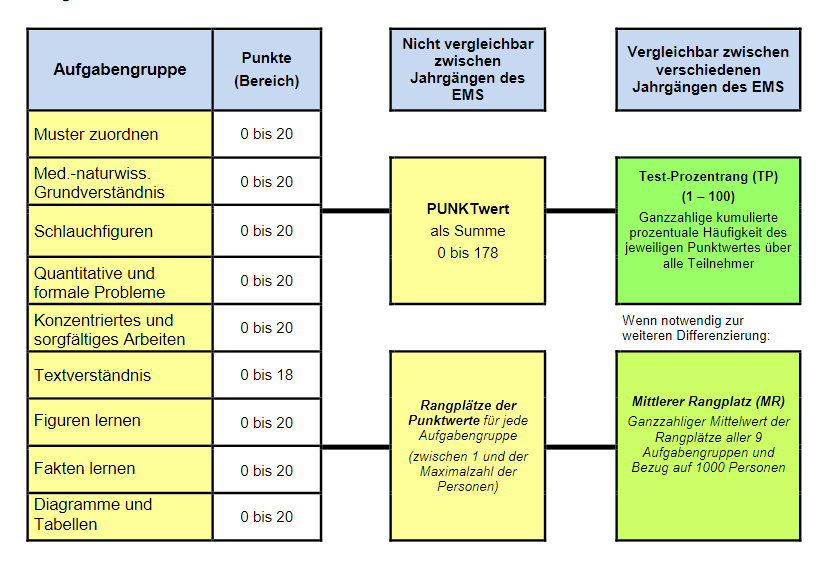 Eignungstest für das Medizinstudium - Beispiele